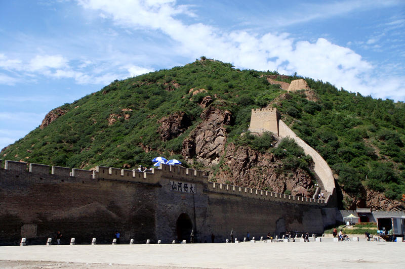 河北省张家口市境内的长城关隘大境门。